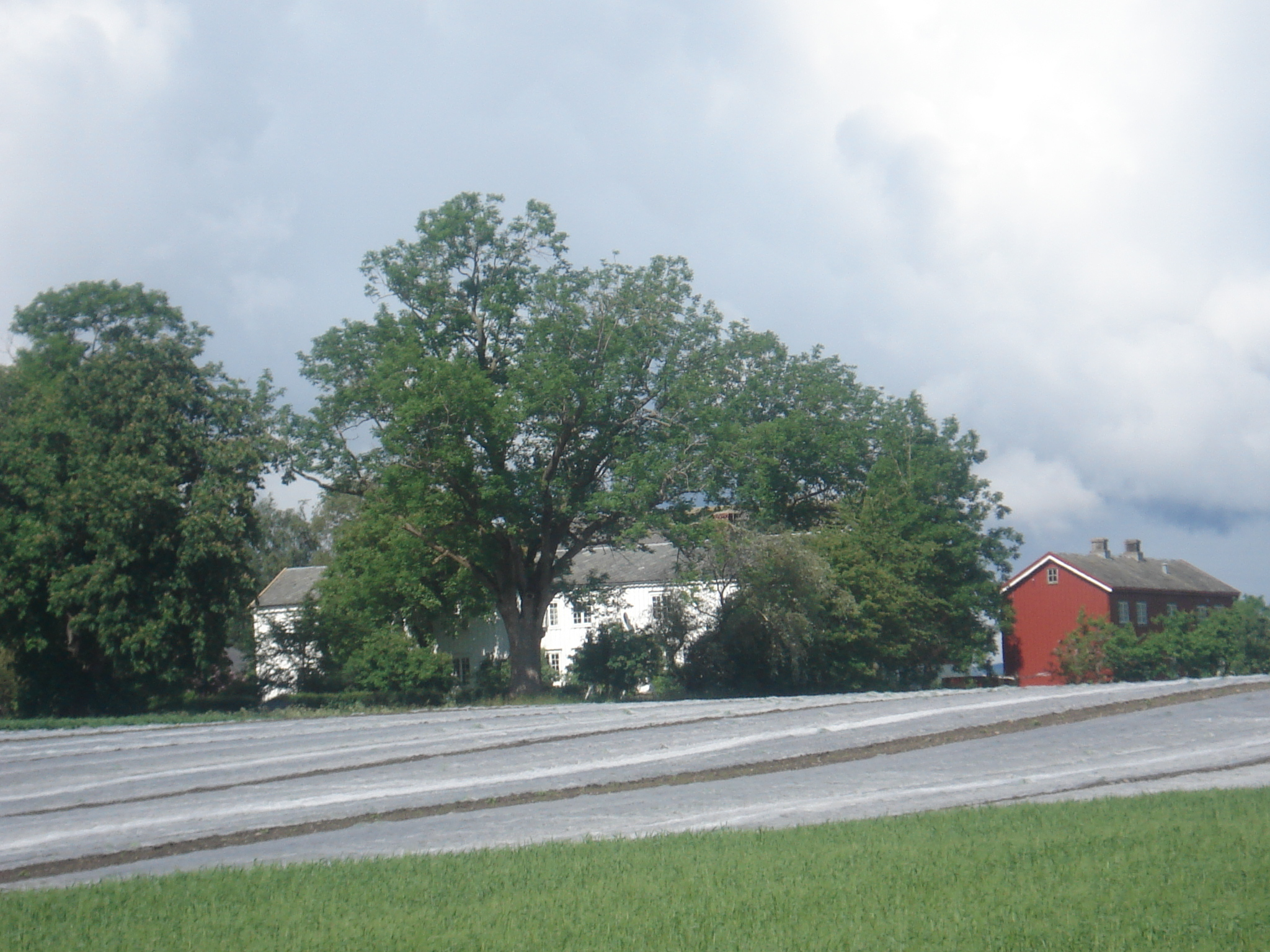 Mo prestegård på Frosta